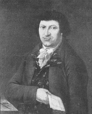 Schlucker Philipp (1748-1820) Waldamtsbaumeister. Schlucker erbaute die 22 km lange Mauer um den Lainzer Tiergarten.